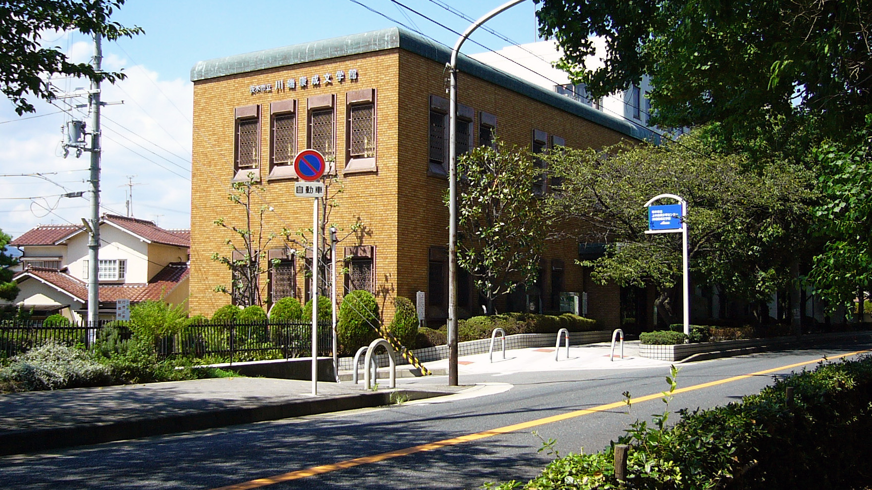 Kawabata Yasunari Museum in Ibaraki, Osaka Prefecture, Japan)